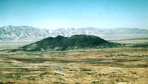 Esta foto es un recorte de un archivo ya compartido por alguien en wikimedia commons y centra la imagen del volcán cerro prieto.